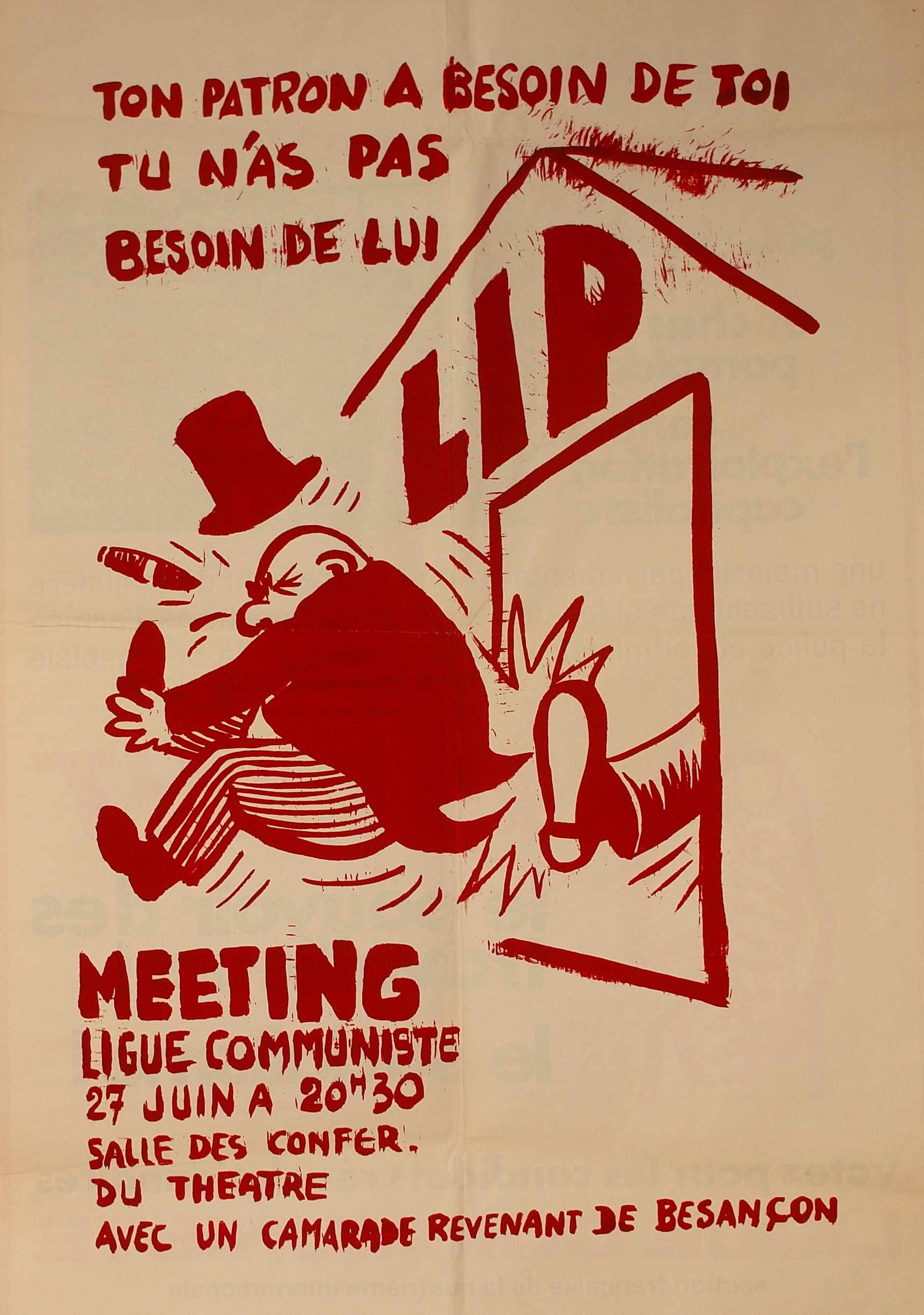 Exposition Mai 68 et la suite..., à Villeneuve-la-Guyard (Yonne, France) , du 22 au 29 mai 2018